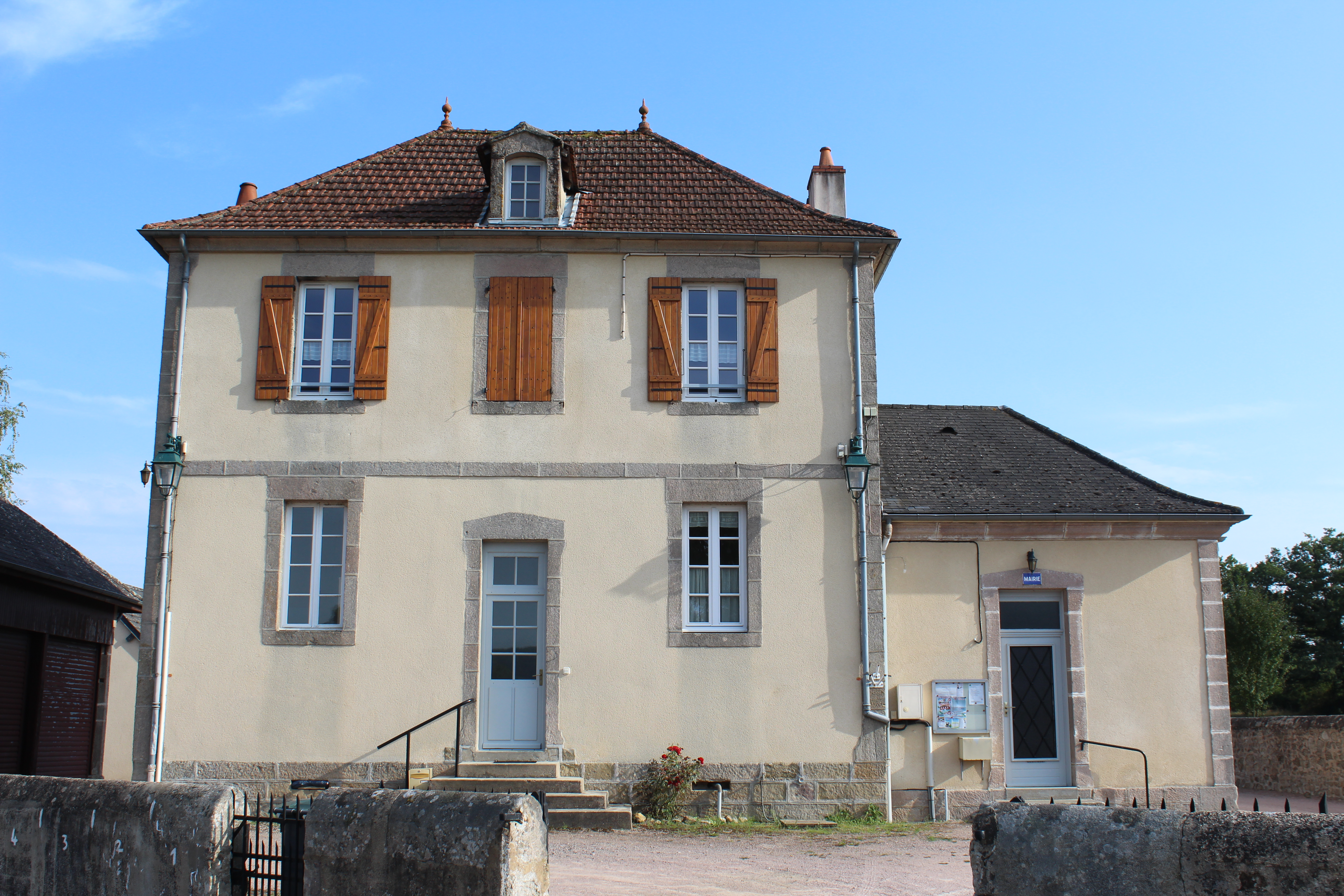 Mairie de Saint-Nizier-sur-Arroux.